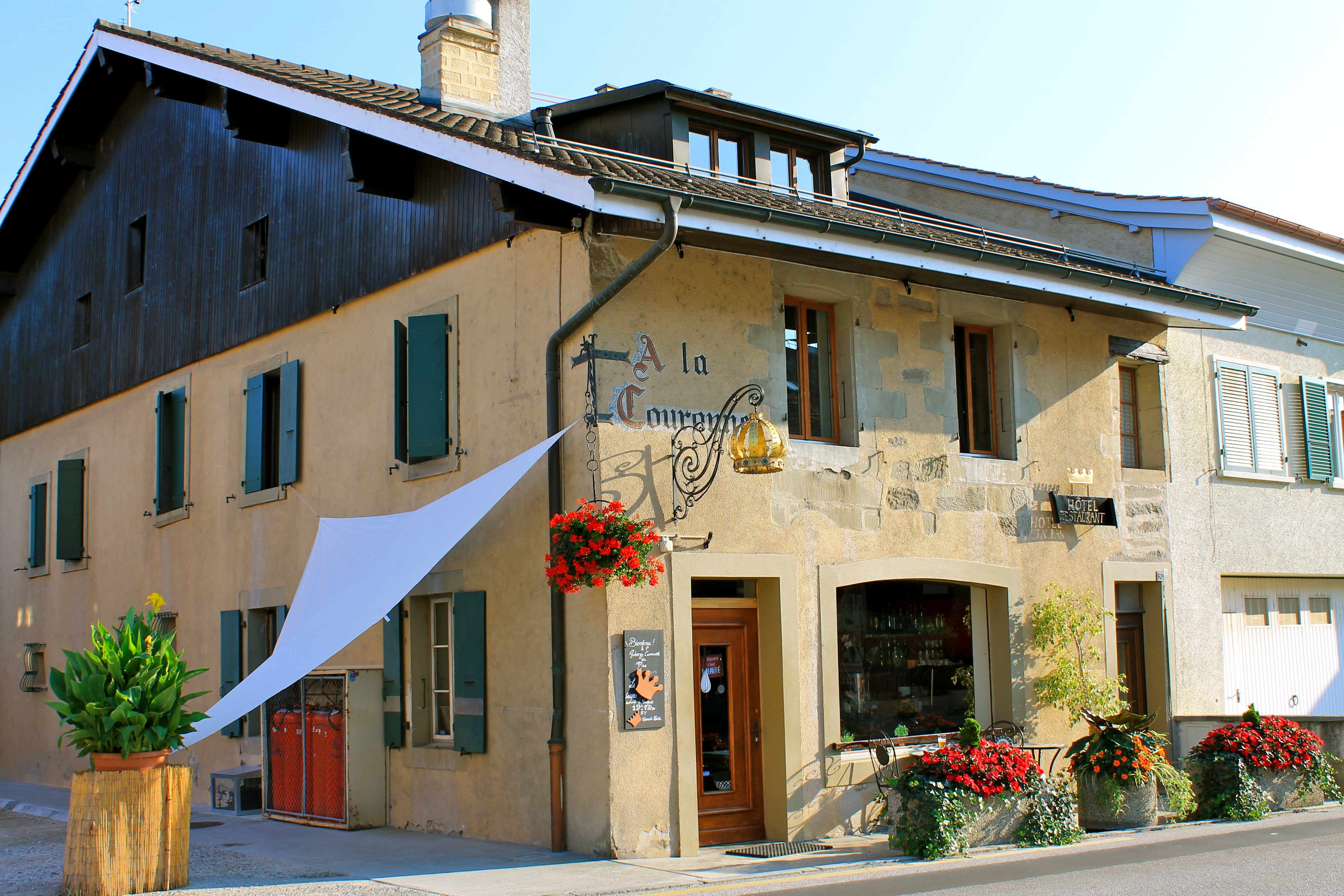 Tannay